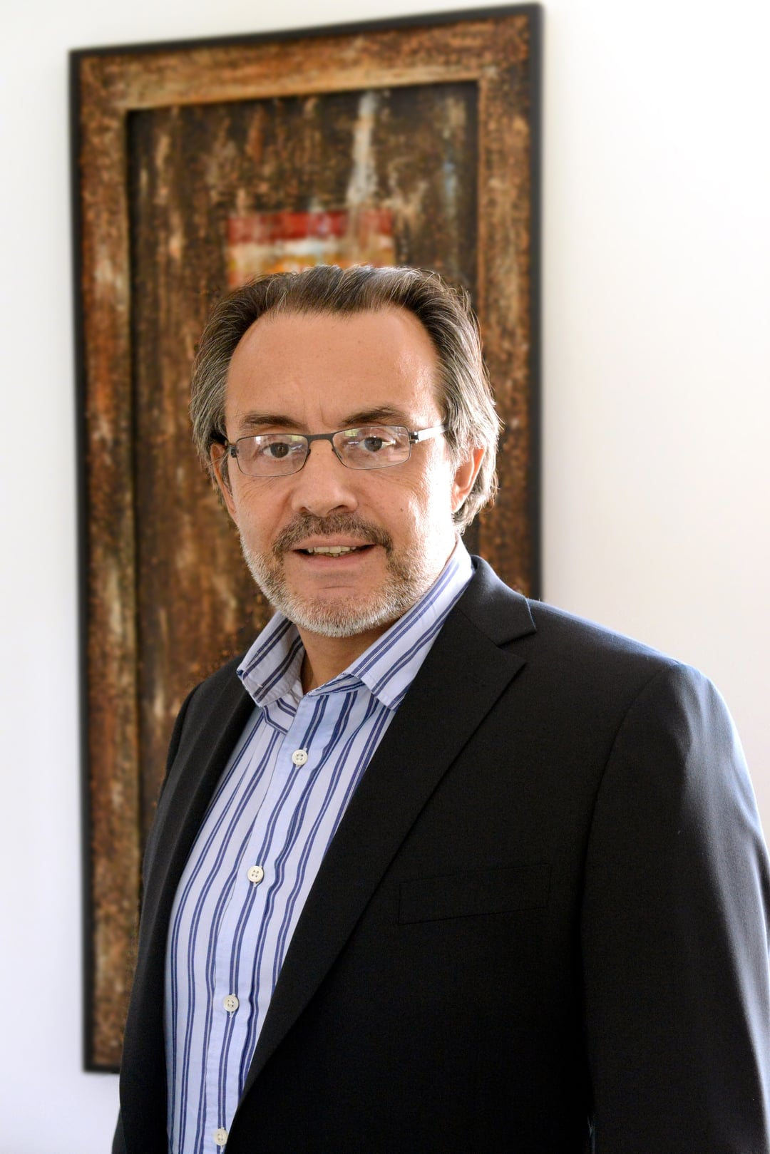 Portrait de Jean-Piette Nadir